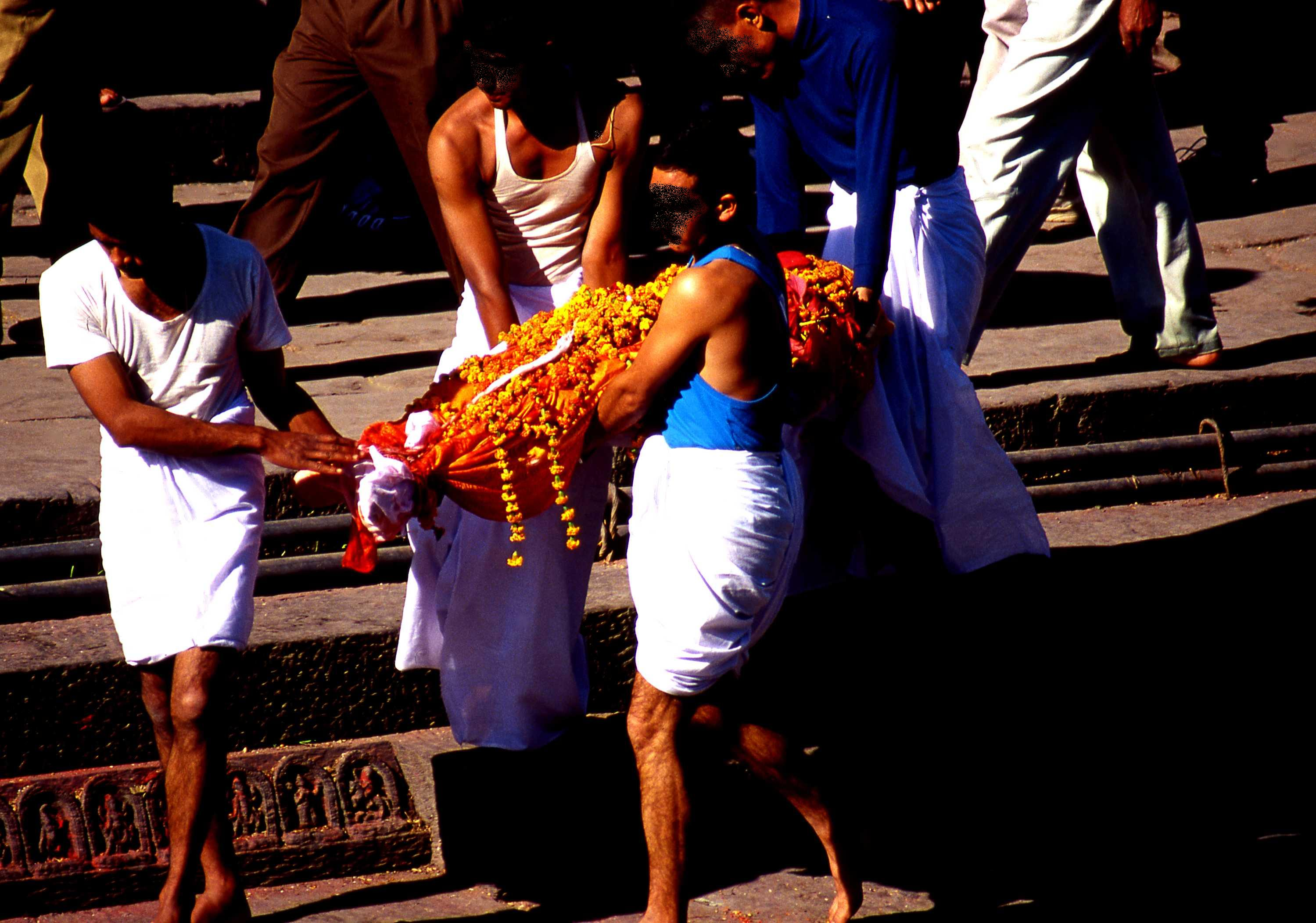 パシュパテイナート（Pashupatinath）パグマティ川火葬場 遺体搬入